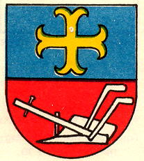 Wappen von Froideville Kanton Waadt Schweiz